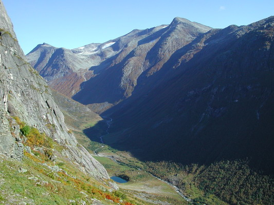 Glomdalen